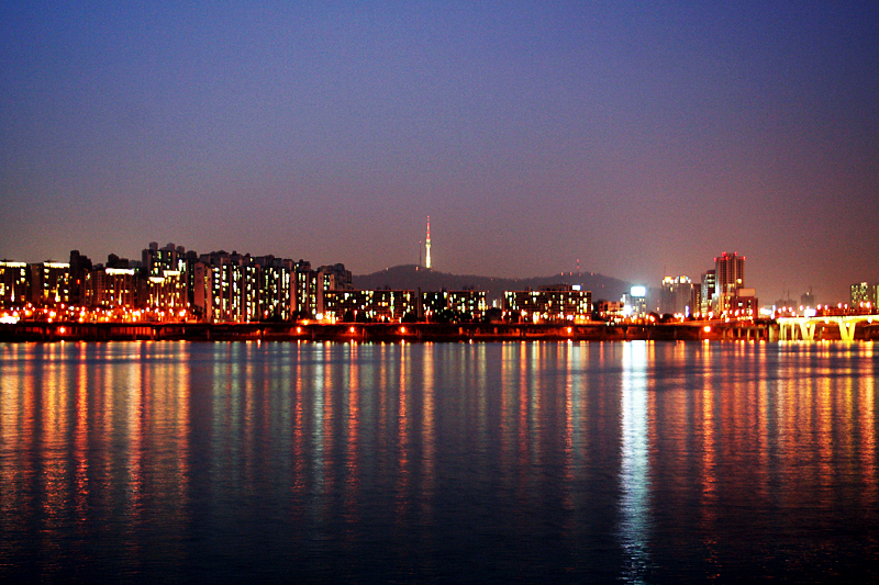 여의도동, 서울